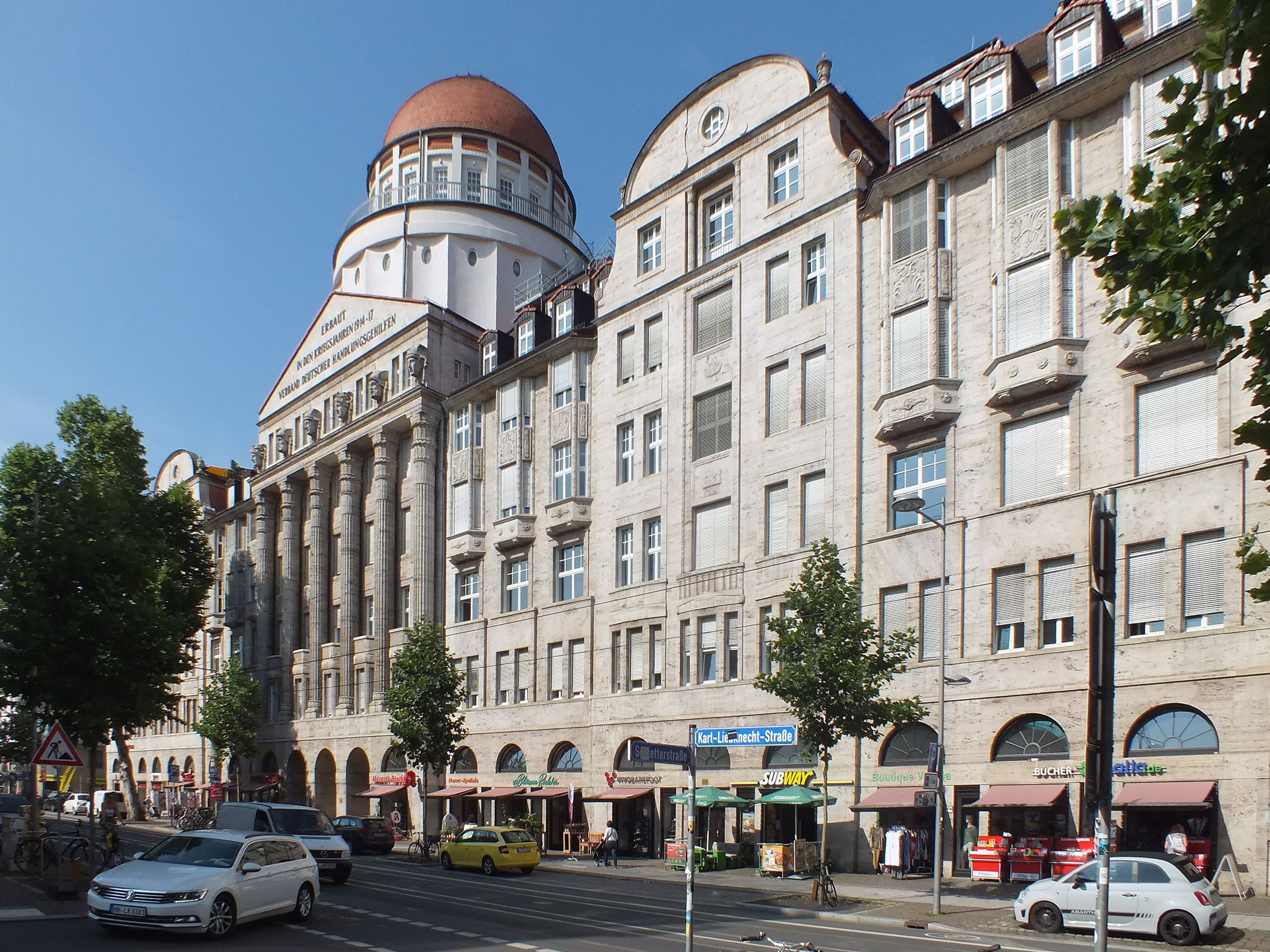 Wünschmann-Haus in Leipzig, Karl-Liebknecht-Straße 8–14, ehemals Haus Deutscher Handlungsgehilfen